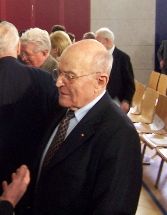 Ludwig Steiner im Gespräch